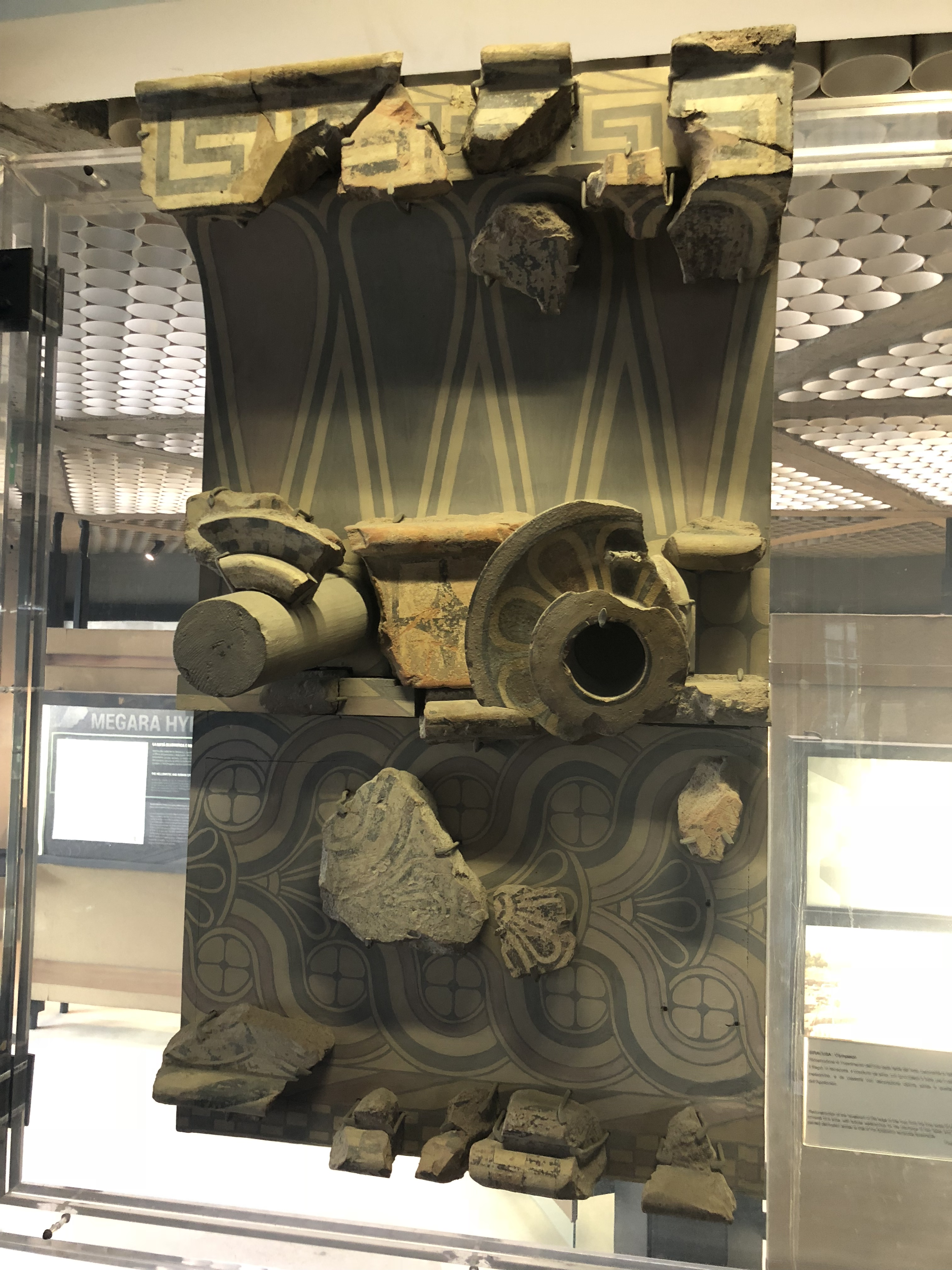 Primi decenni del VI sec a.C.